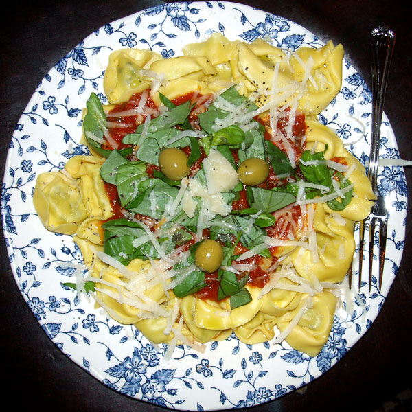 Vegetarian tortellini